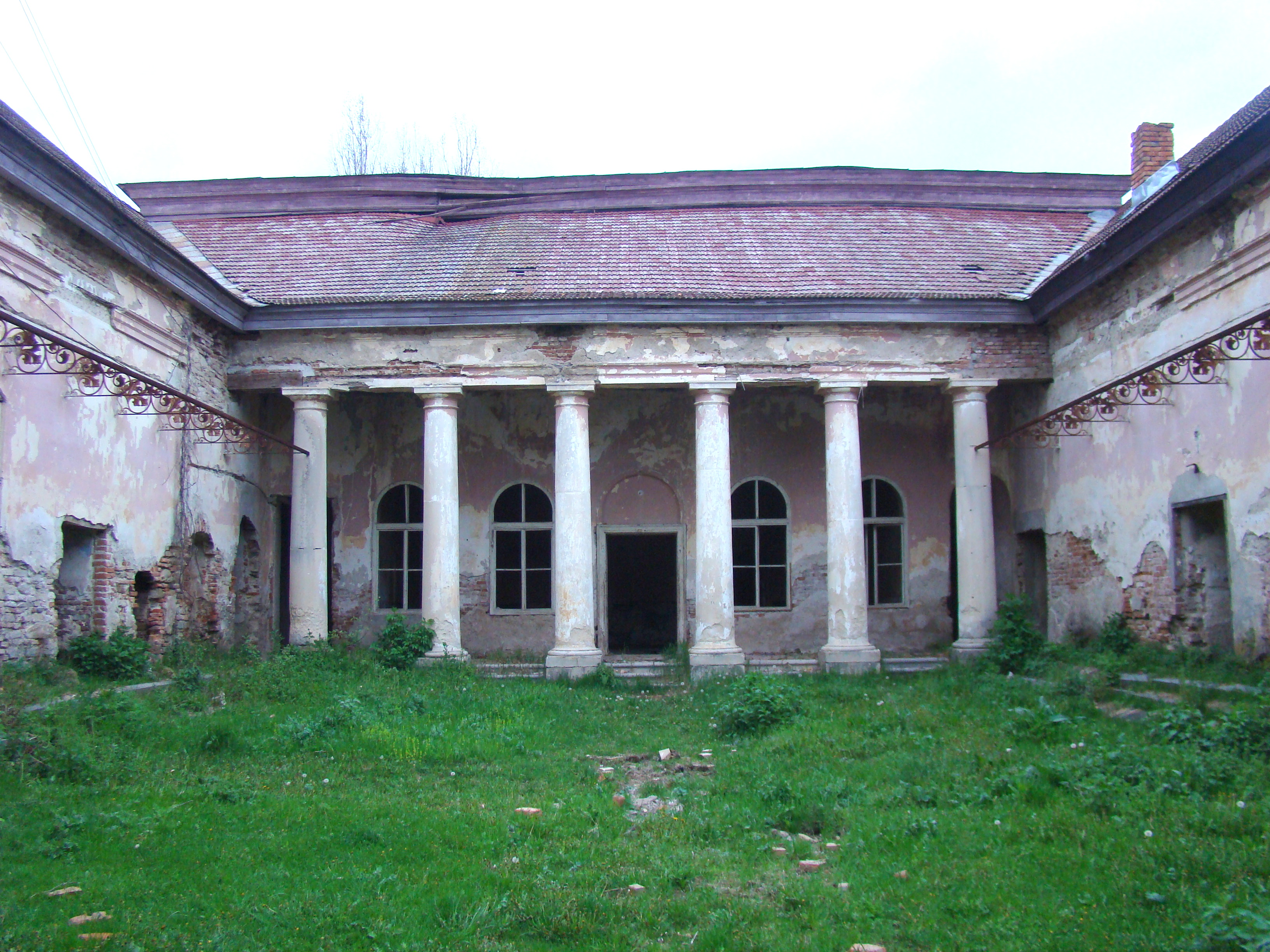 Castelul Bethlen, sat Dragu; comuna Dragu, judeţul Sălaj 01